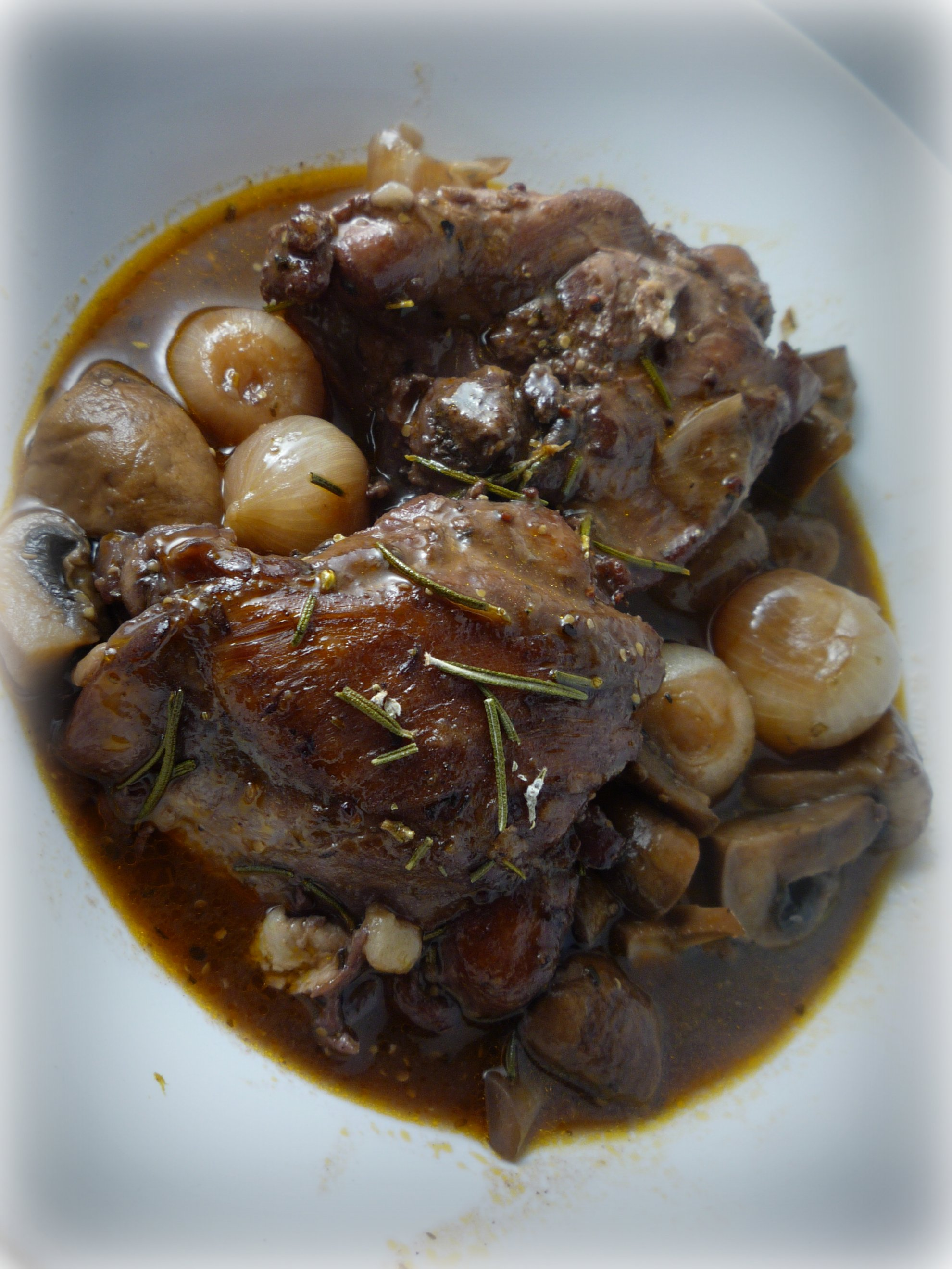 Gourmet coq au vin